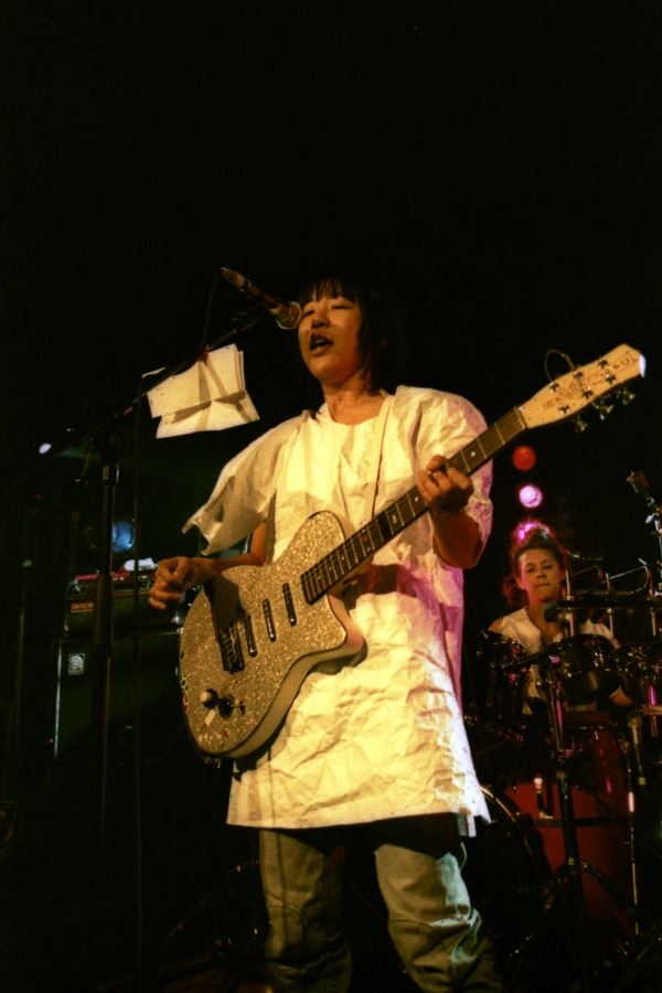 Yoshimi P-We esiintymässä OOIOO:n kanssa vuonna 2004.